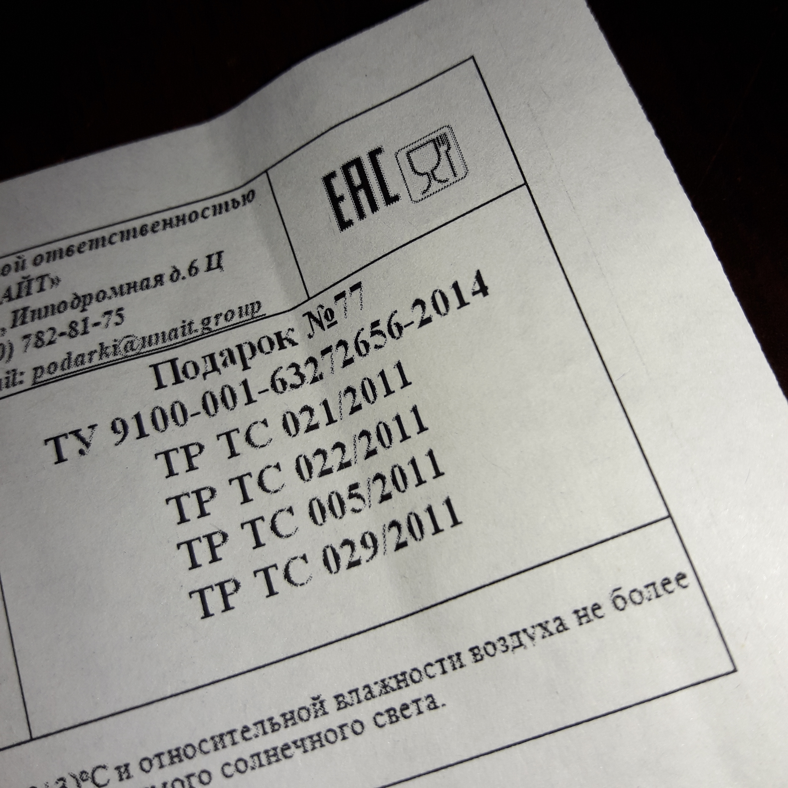 Этикетка от новогоднего подарка с конфетами. Маркировка EACи номера технических регламентов